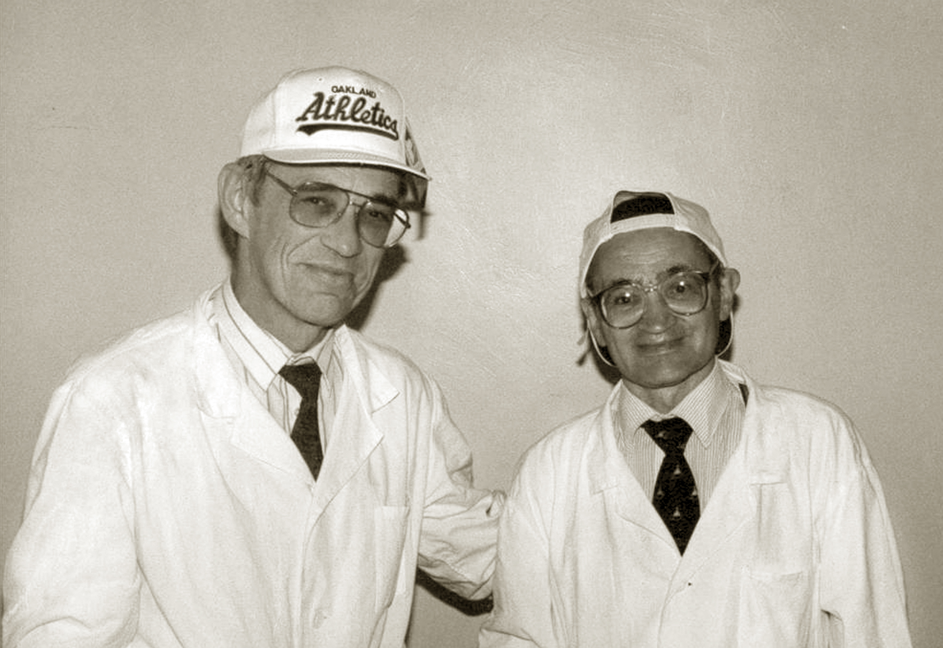 Профессора Э. К. Цыбулькин и Н. П. Шабалов